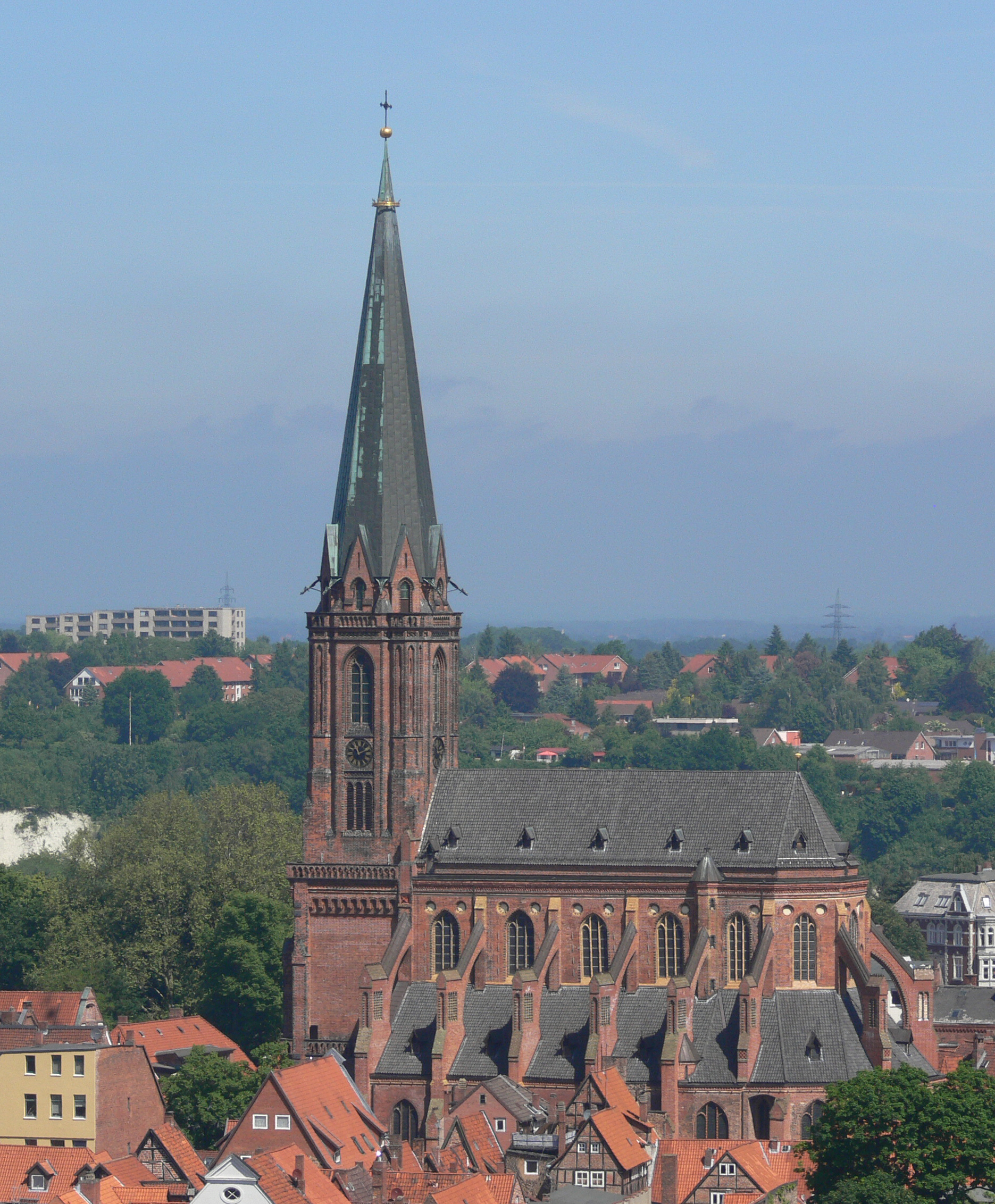 Lüneburg, Nicolaikirche, vom Wasserturm aus gesehen